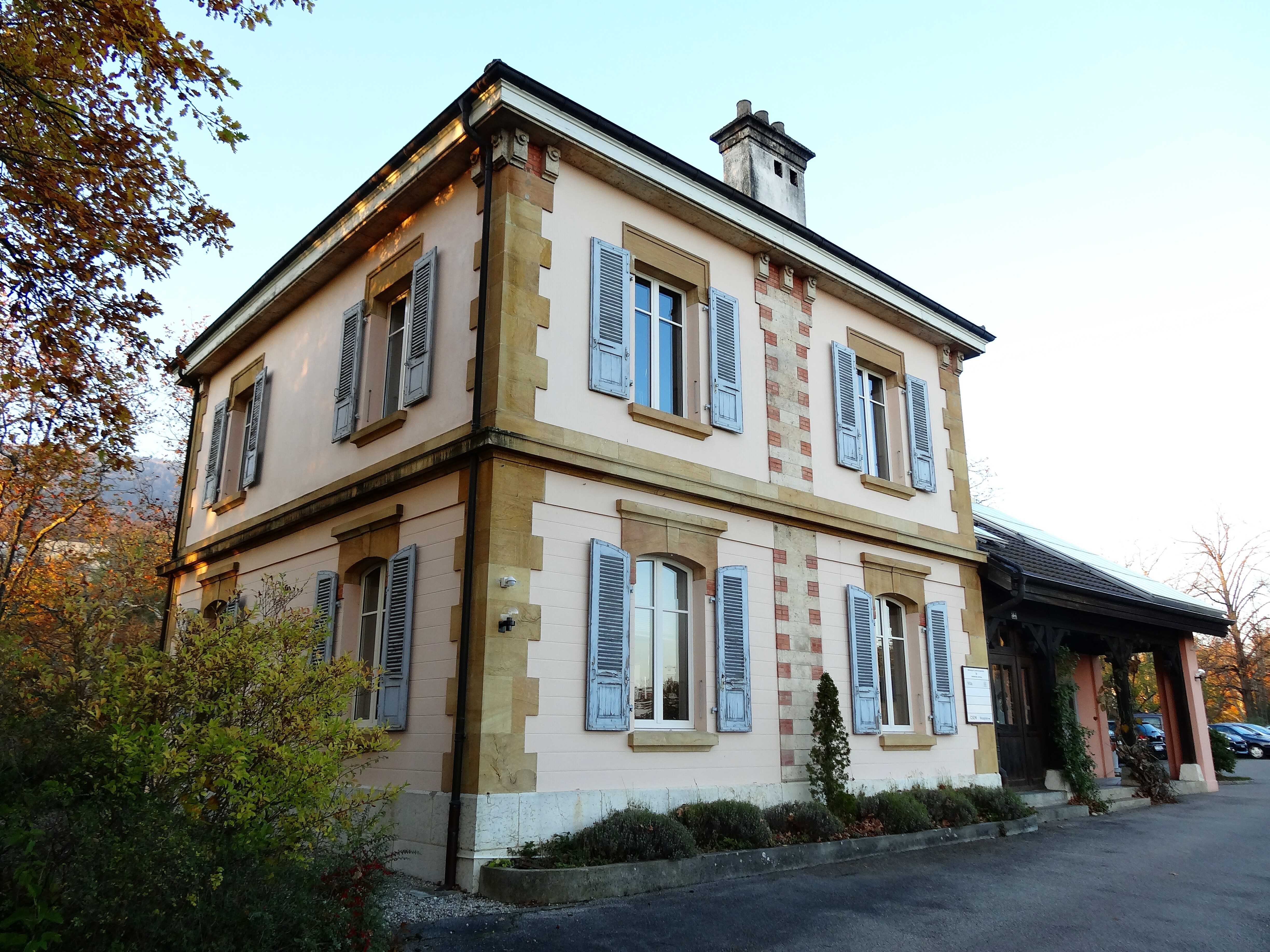 Neuchâtel, L'Observatoire, La Villa (jadis le logement d'un directeur de l'Observatoire, renseignement obtenu d'une personne travaillant à l'IMT.)